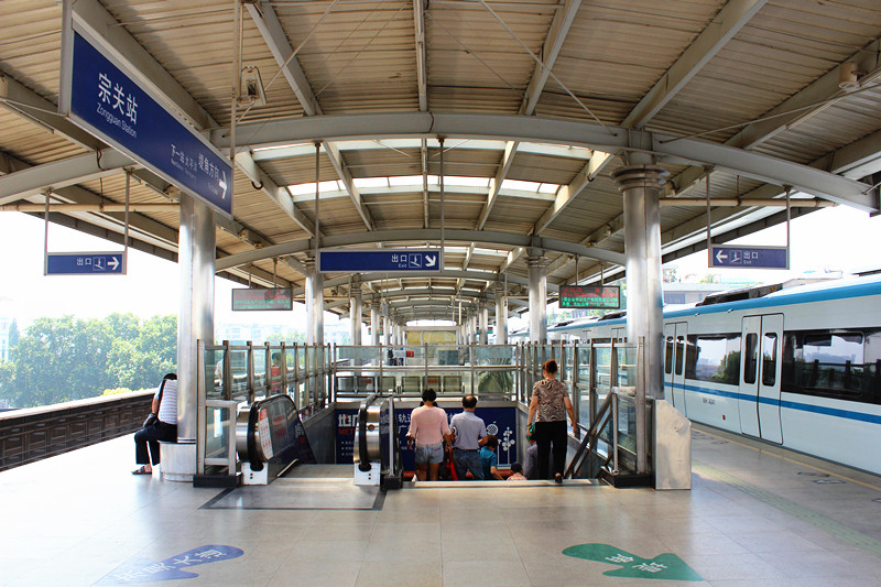 中文（中国大陆）: 武汉地铁1号线